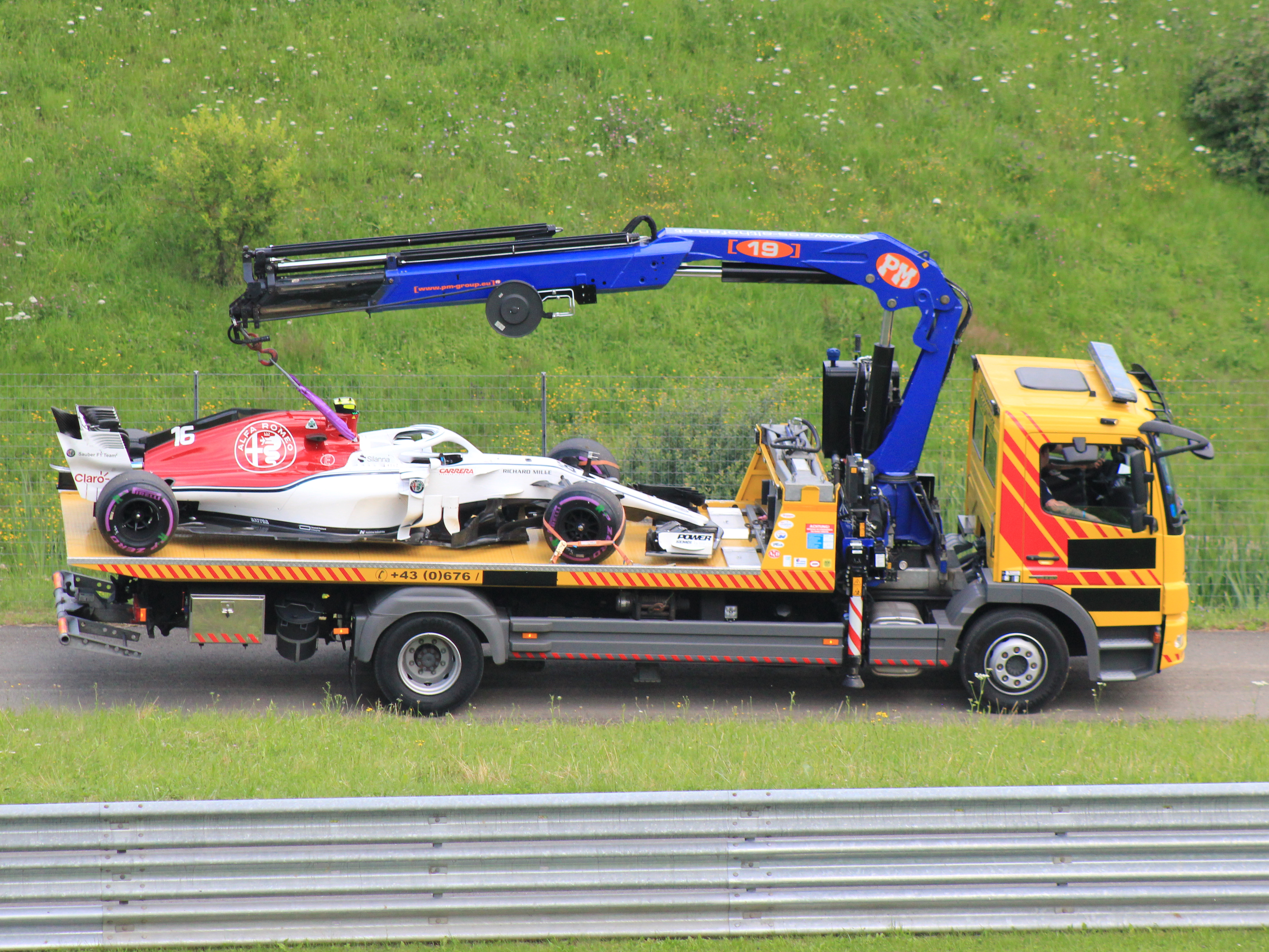 Leclercs Wagen im dritten freien Training wird abgeschleppt